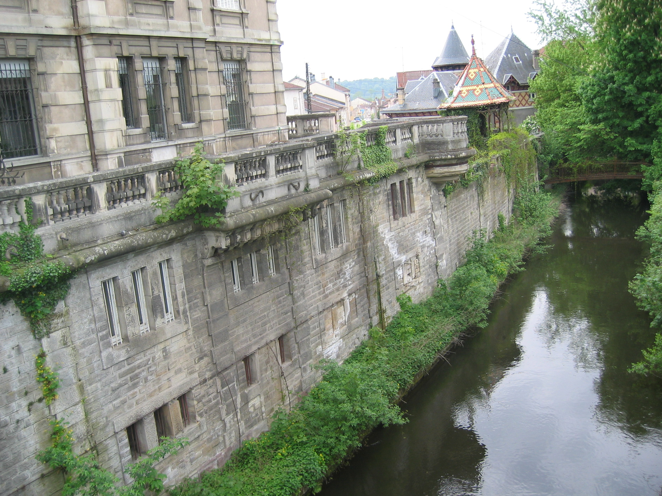 Martial Mai 2005 Il ne s'agit pas des remparts de la Ville, mais d'une partie de la maison, dite Chateau HANUS du nom des fondateurs des Grandes Brasseries de Charmes KB. Actuellement cette belle batisse abrite une grande banque Française. Claude Juillet 2010